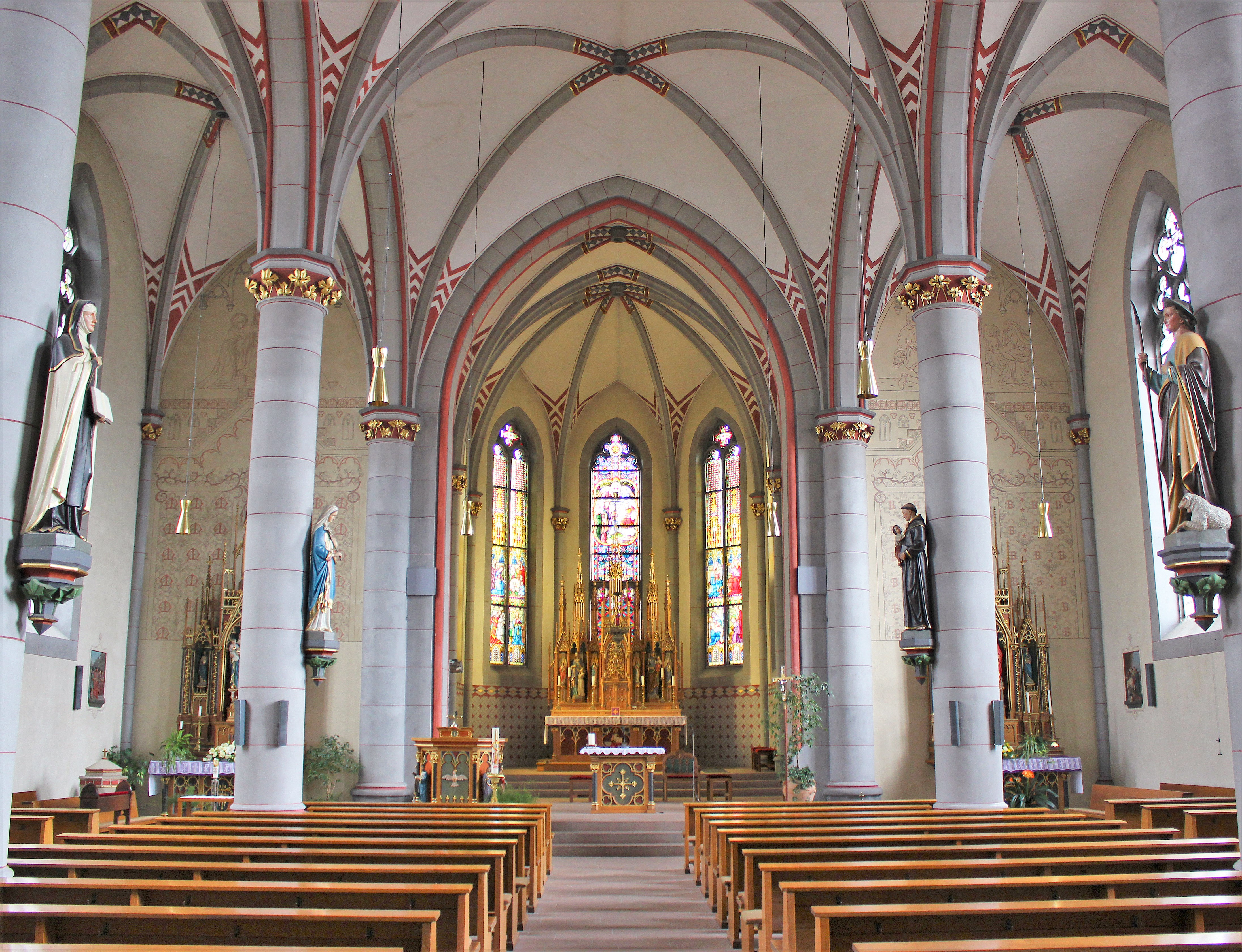 Blick ins Innere der katholischen Pfarrkirche St. Marien in Reisbach, einem Ortsteil der Gemeinde Saarwellingen, Landkreis Saarlouis, Saarland